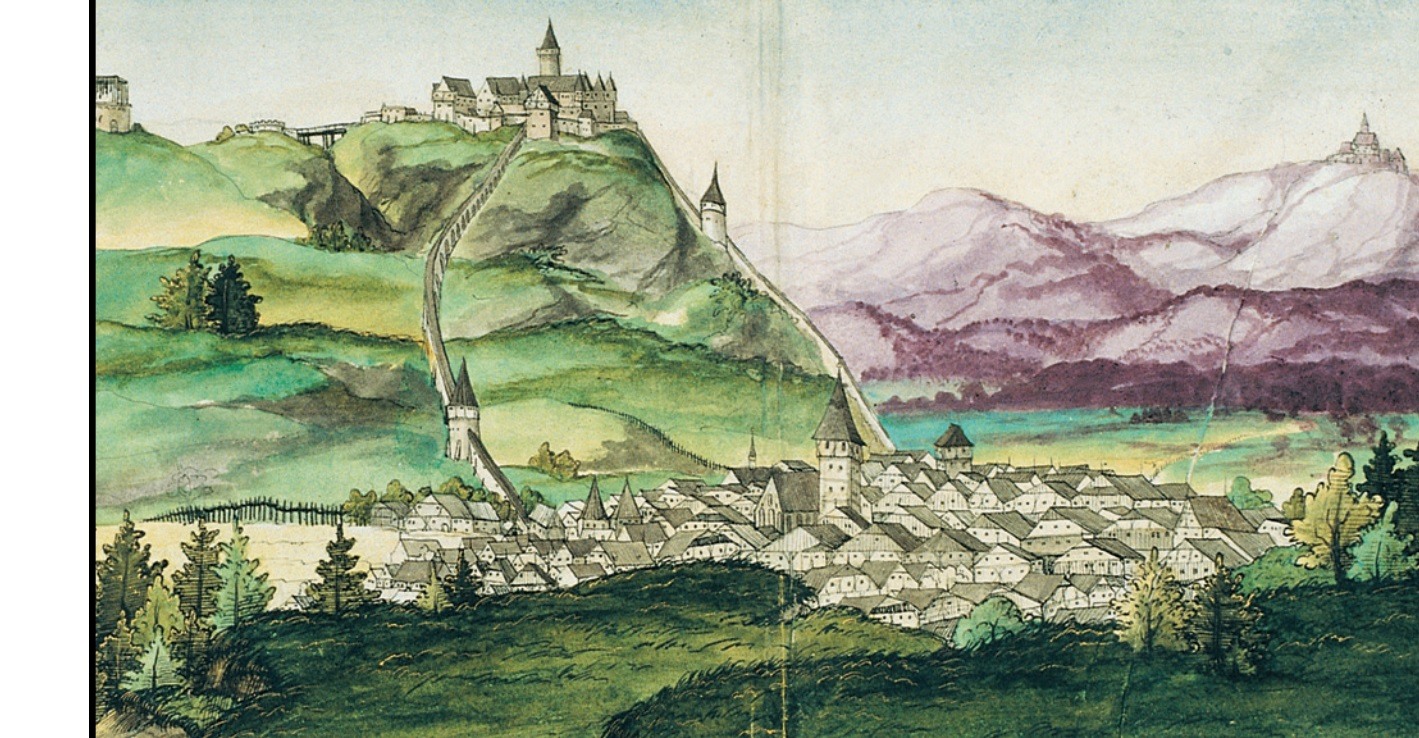 Veduta Náchoda z roku 1536